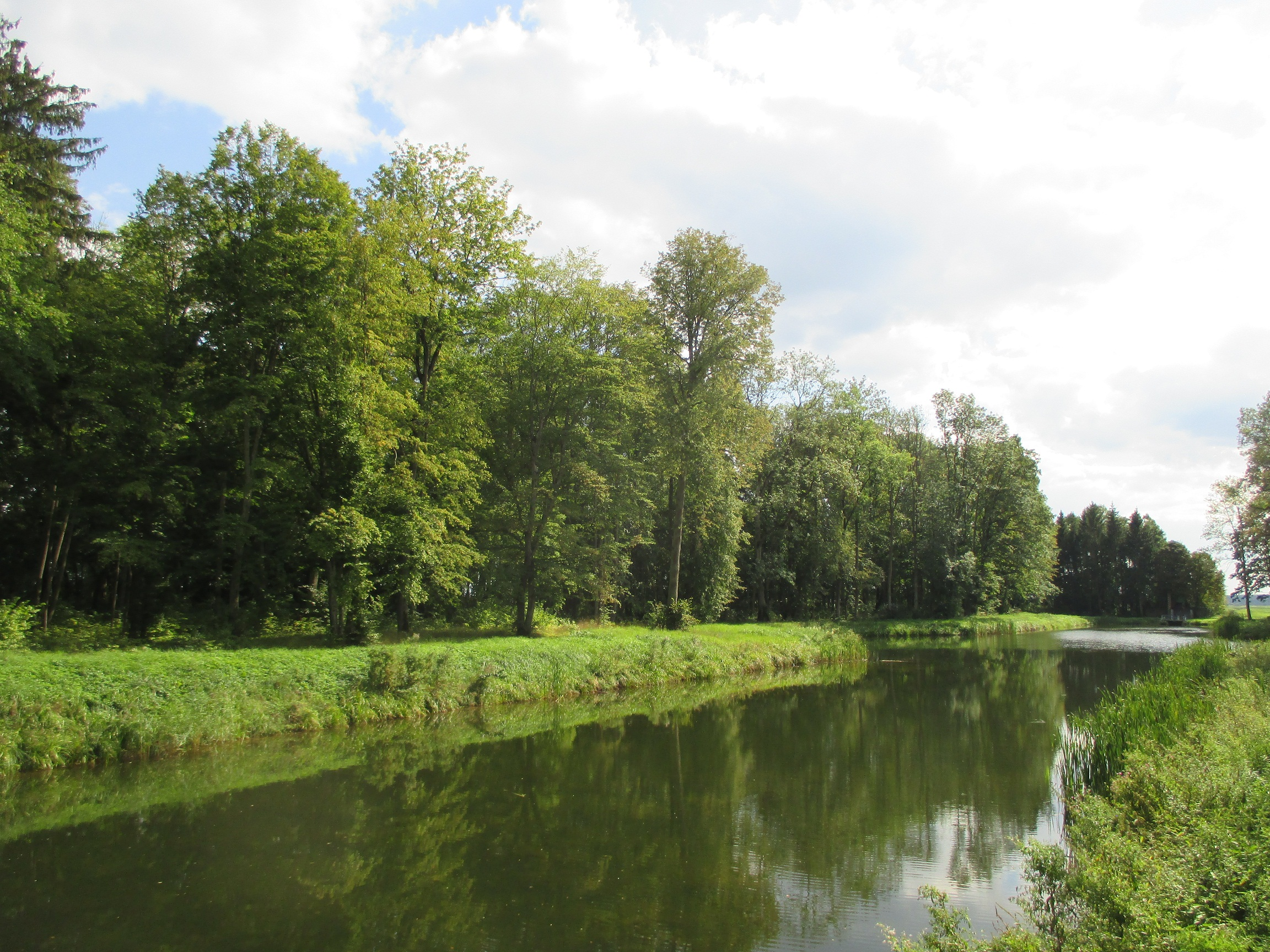 Пагародна, Воранаўскі раён. Парк, сажалка